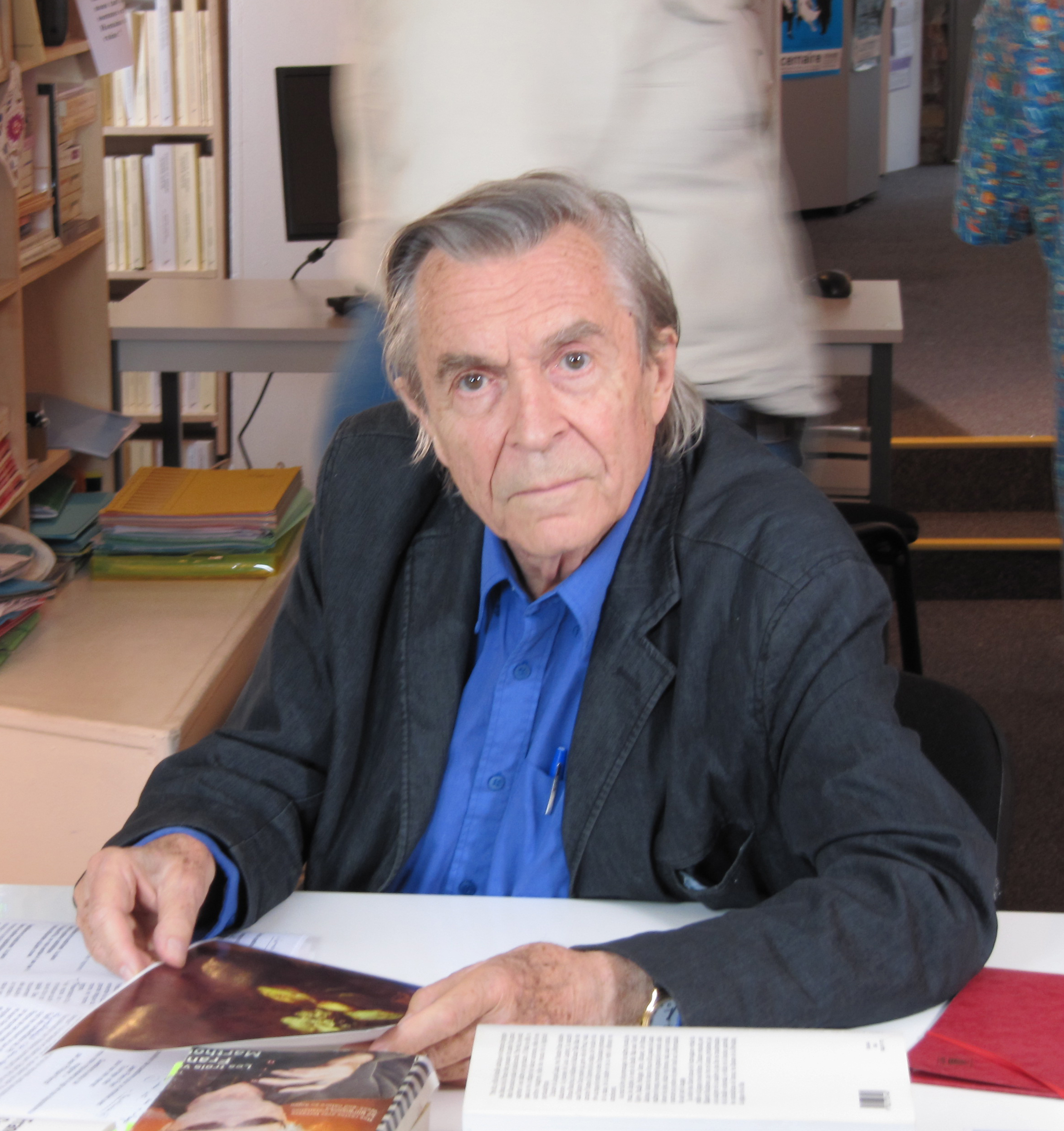 Jean-Pierre Faye lors du tournage du film "Le chemin des points de suspension"